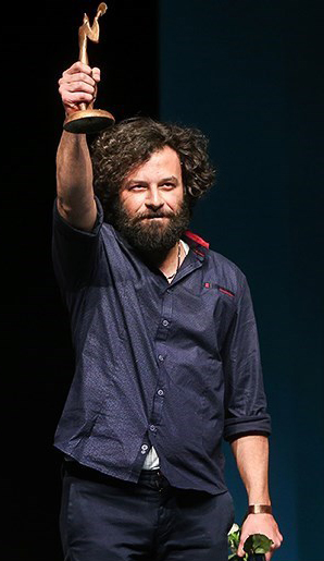 حسام منظور بازیگر نمایش اودیسه برگزیده سیزدهمین جشن بازیگر خانه تئاتر ۱۲ ارديبهشت ۱۳۹۵